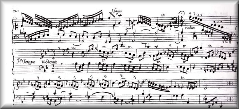 Istituto Europeo di Musica Azzolino della Ciaja Frammento manoscritto dalla Sonata III